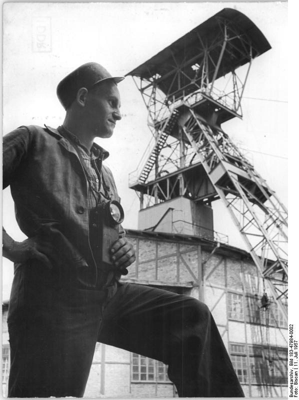 Salzbergwerk Bartensleben, Bergmann, Förderturm Zentralbild Biscan Bö-Qu 11.7.1957 Junger Bergmann zu den VI. Weltfestspielen nach Moskau delegiert In wenigen Tagen fährt der junge Lehrhauer Josef Buberl vom Jugend-Salzbergwerk Bartensleben, Kreis Haldensleben, nach Moskau, um als einziger Delegierter seines Kreises an den Weltfestspielen teilzunehmen. Buberl, der seit Jahren immer und überall die Interessen der jungen Bergleute vertritt, wurde auch wieder in den Kreistag gewählt. UBz: Lehrhauer Josef Buberl (Im Hintergrund der Förderturm des Salzbergwerks, des einzigen Bergbau-Jugendbetriebes der DDR).